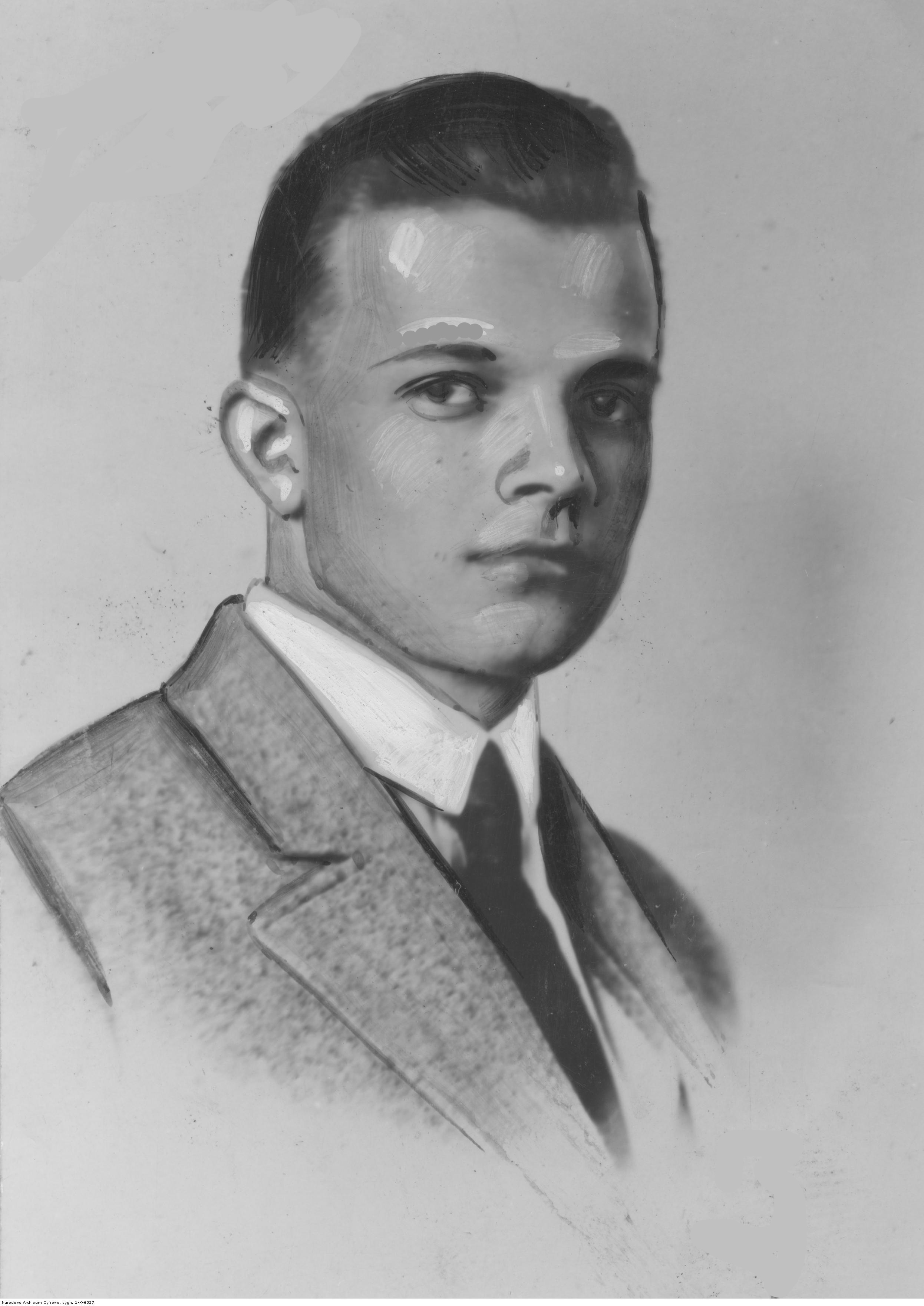 Adam Harasowski - kompozytor. Fotografia portretowa.